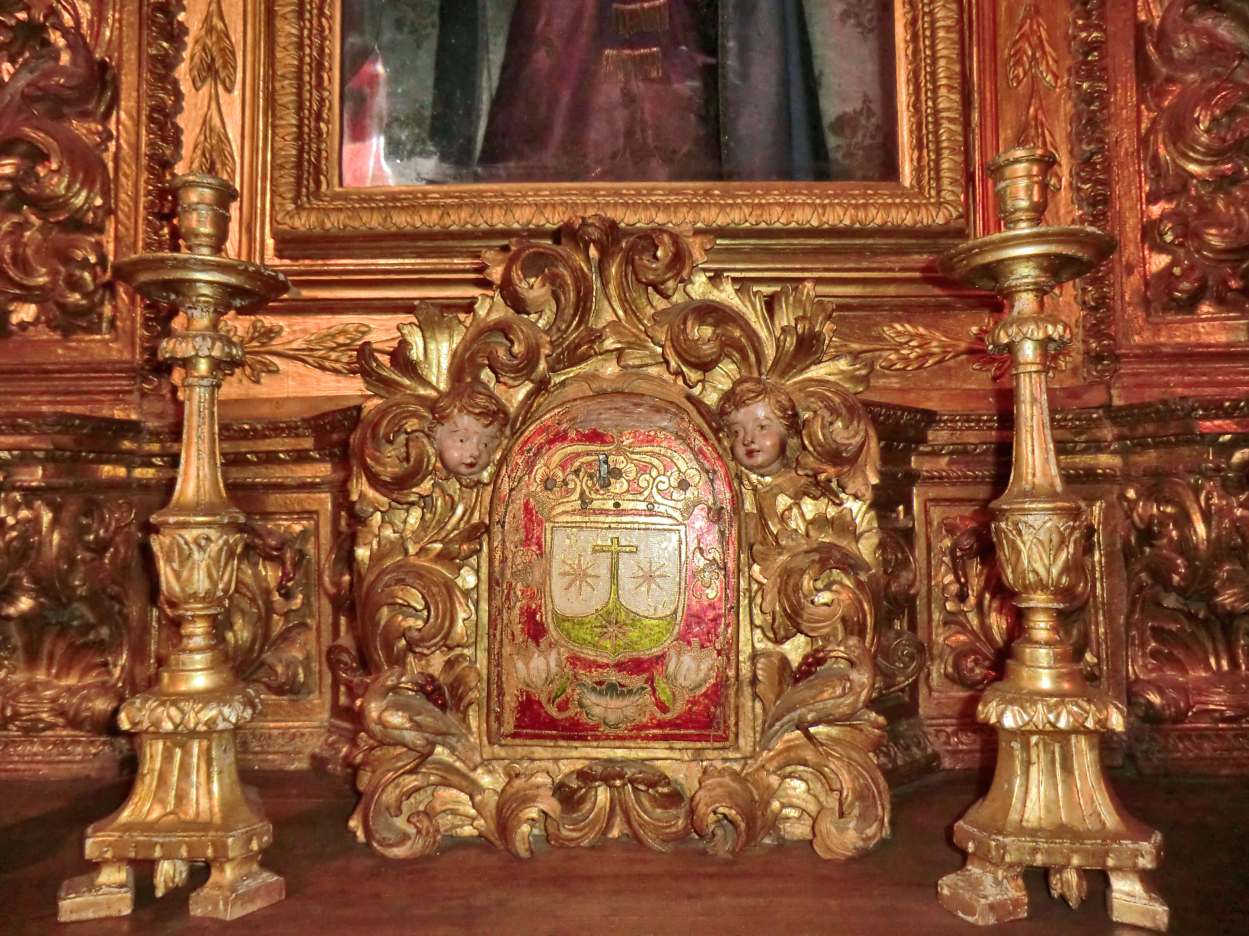 Igreja das Carmelitas ou Igreja de São João Evangelista This file was uploaded for Wiki Loves Monuments in Portugal with the unique identifier 71150.